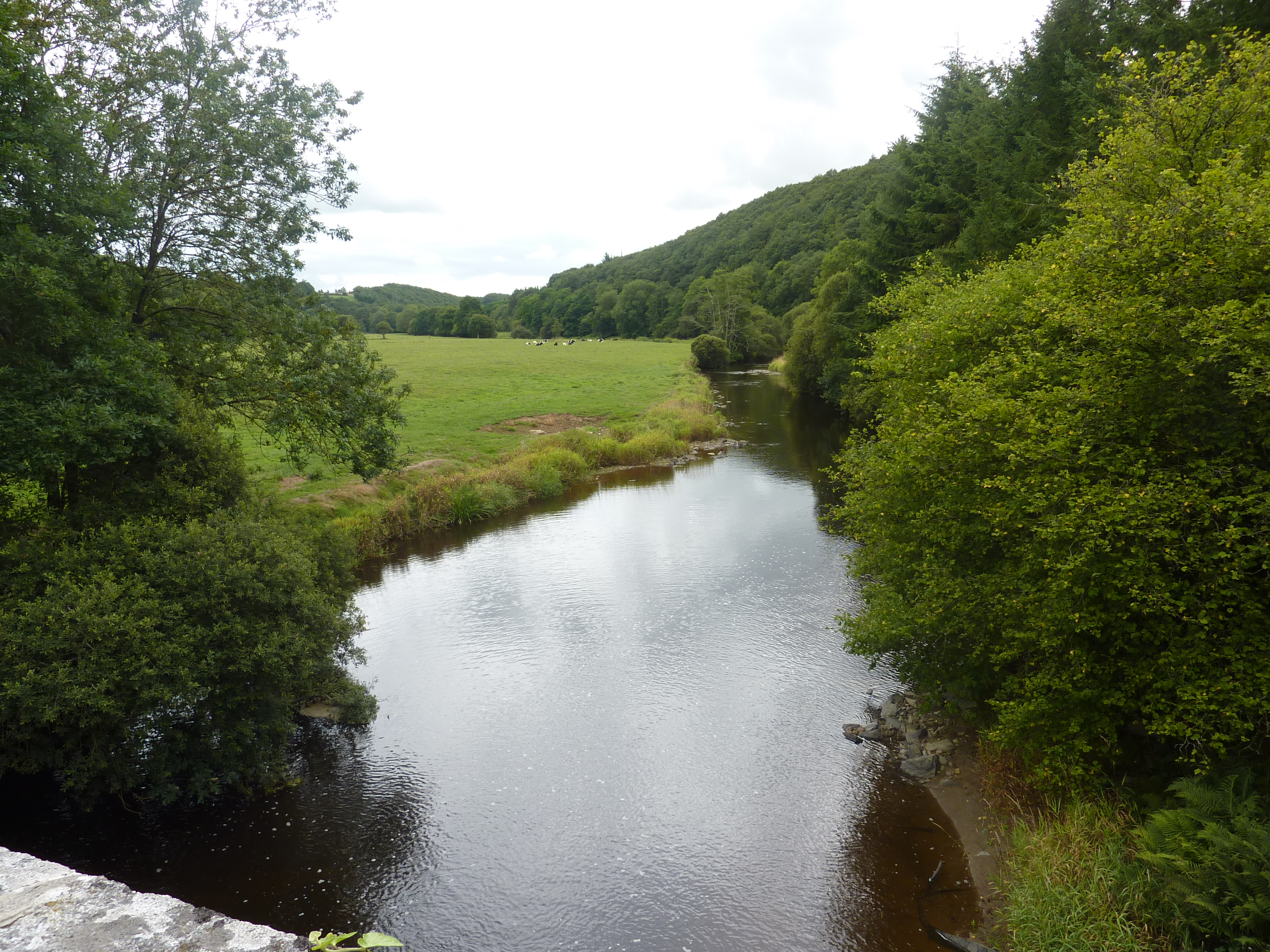 Locmaria-Berrien: l'Aulne et sa vallée vues du pont de la route en direction de Poullaouen